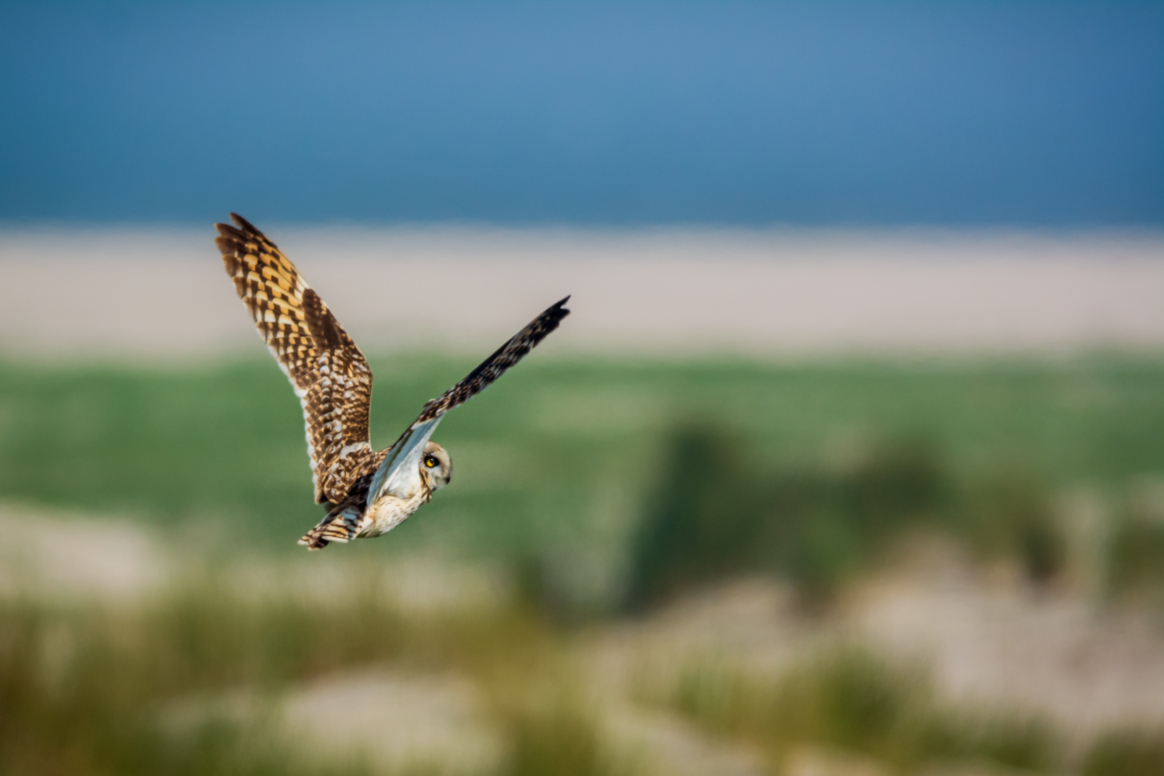 Sumpfohreule auf Spiekeroog